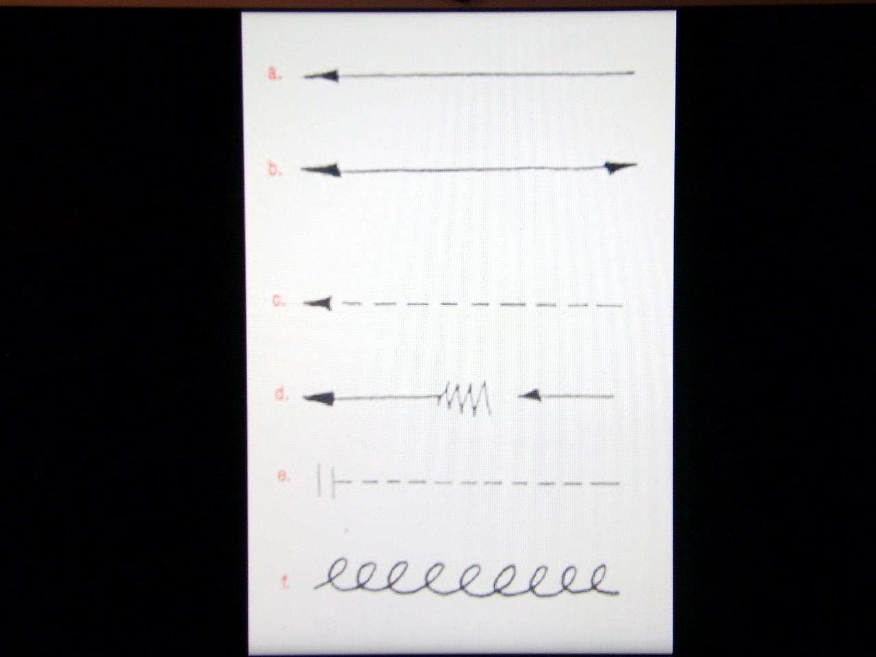 Leyenda diagramas Lombardi